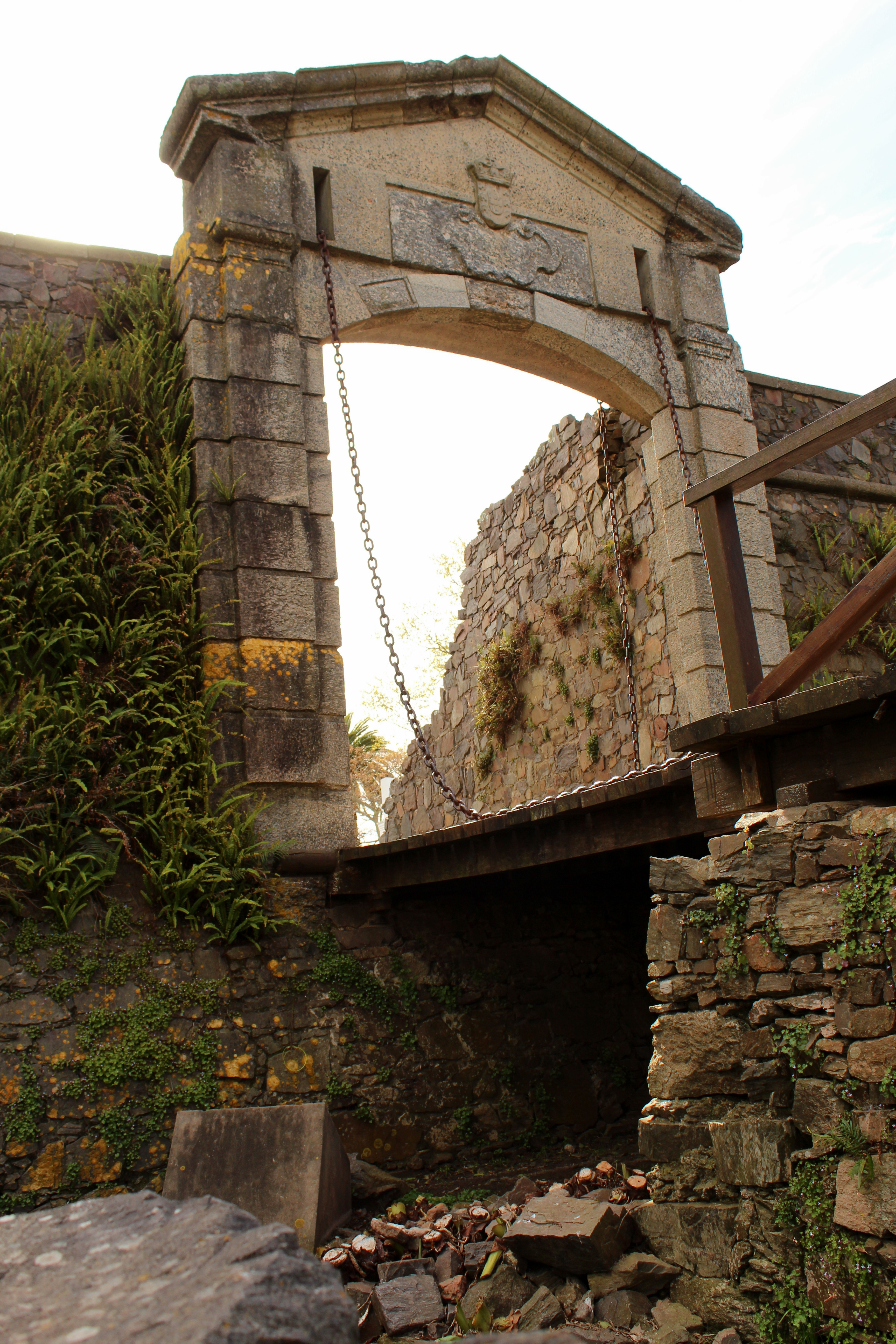 Sector de las murallas de la antigua Colonia del Sacramento, portón de campo, foso, bastión de San Pedro, bastión de San Miguel y entorno. Ubicada en el departamento de Colonia. La puerta de la Ciudadela era la principal vía de acceso a la ciudad colonial.